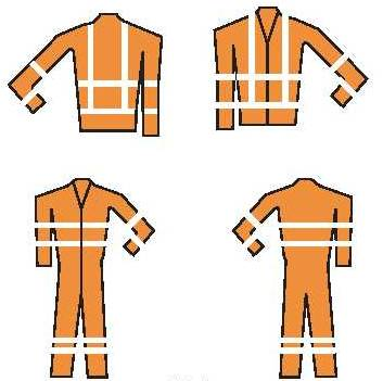 OD 1c „Oblečení“. Příklad výstražného oblečení a oděvních doplňků s označením z retroreflexního materiálu v České republice podle Pravidel provozu na pozemních komunikacích.